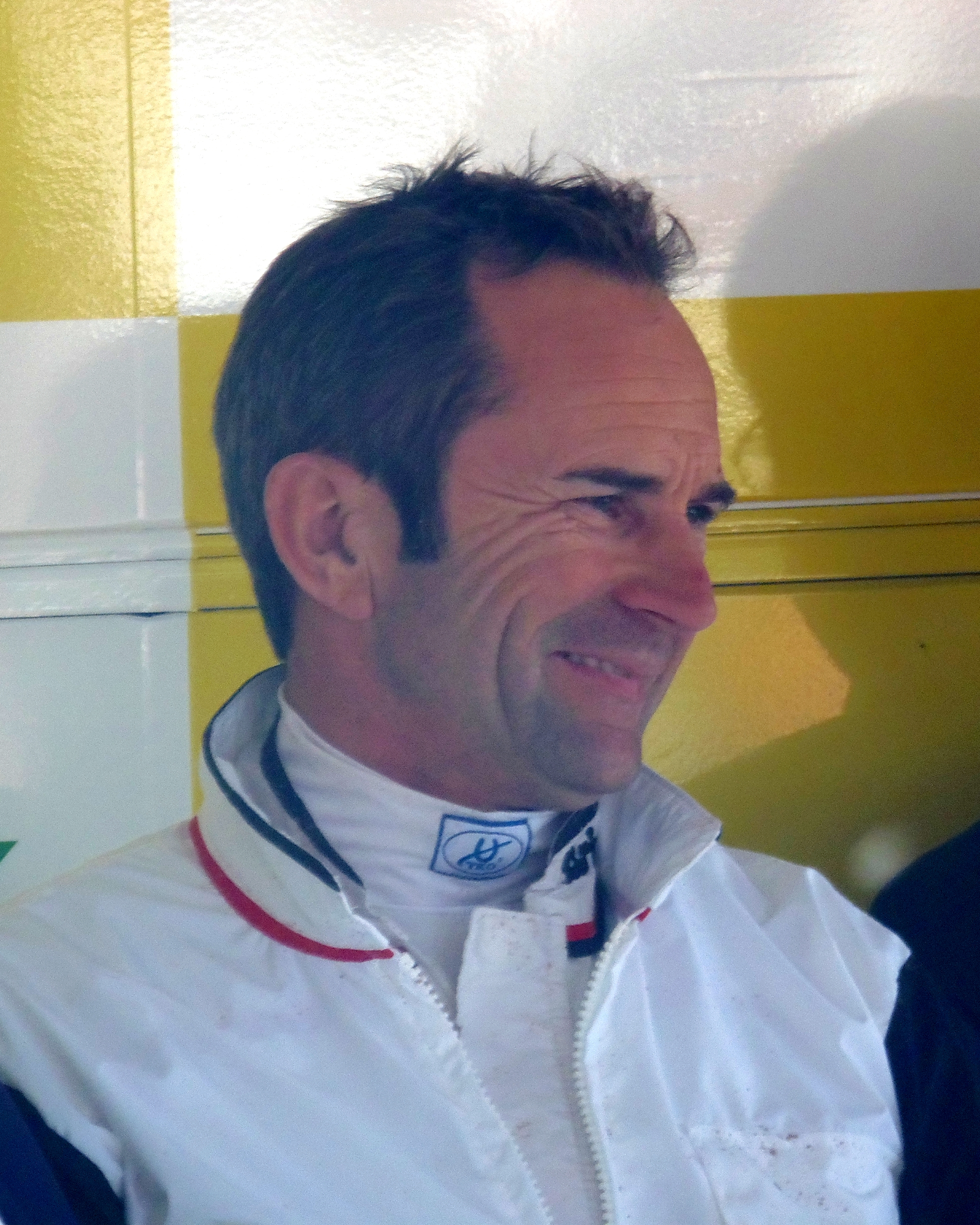 Jean-Michel Bazire lors de la remise des prix de l'épreuve du Grand National du trot sur l'hippodrome de Vire le 26 septembre 2018 (Normandie, France).